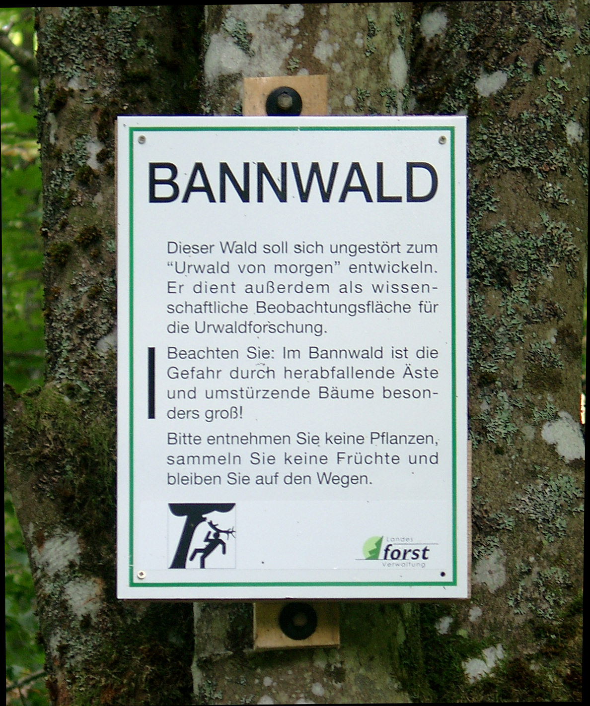 Hinweisschild Bannwald in Baden-Württemberg; Bannwald nahe der Quelle der Lauter bei Schlattstall